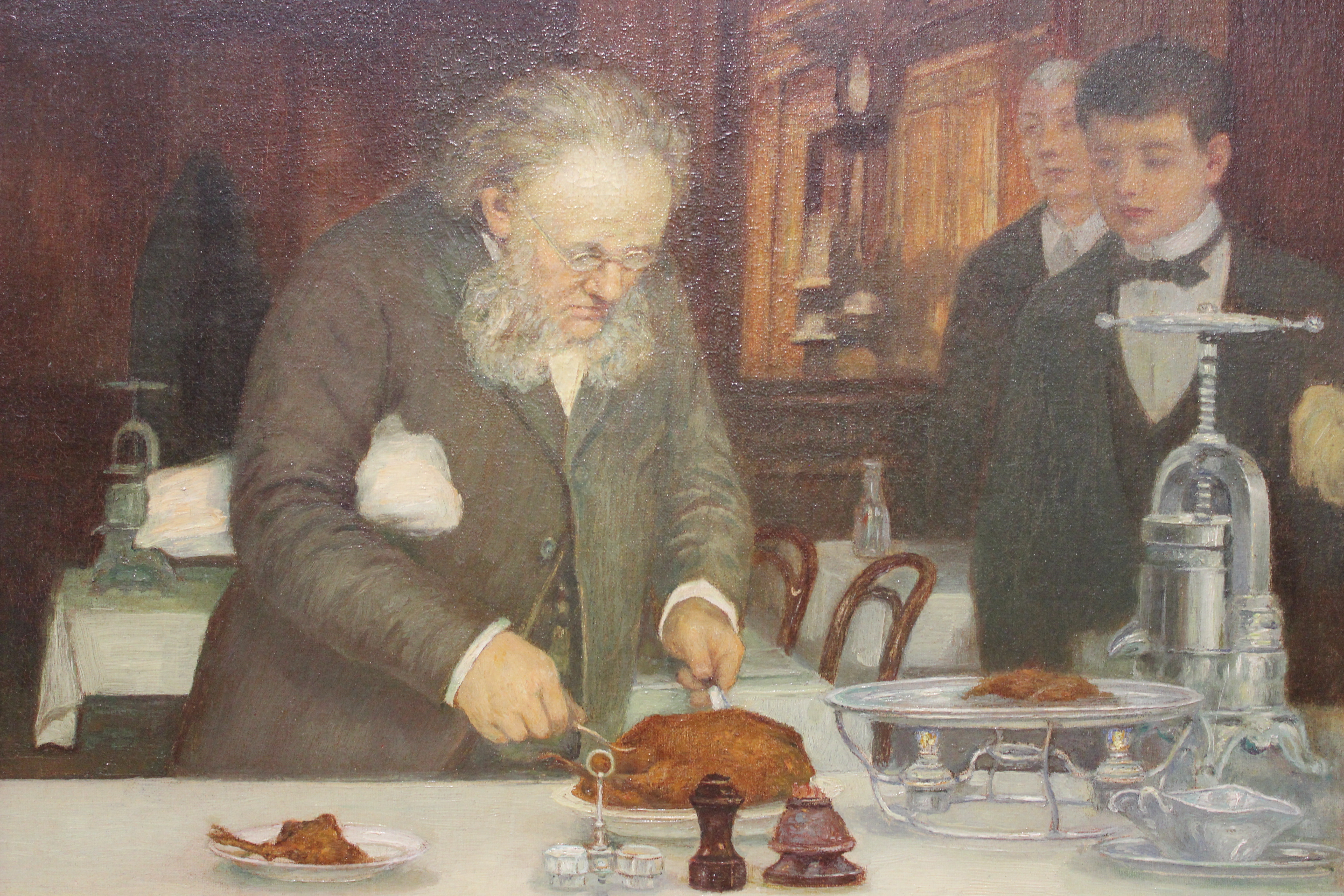 Anonyme fin XIXe siècle - Frédéric découpant le canard - restaurant La Tour d'argent (#100WikiCommonsDays day 41)